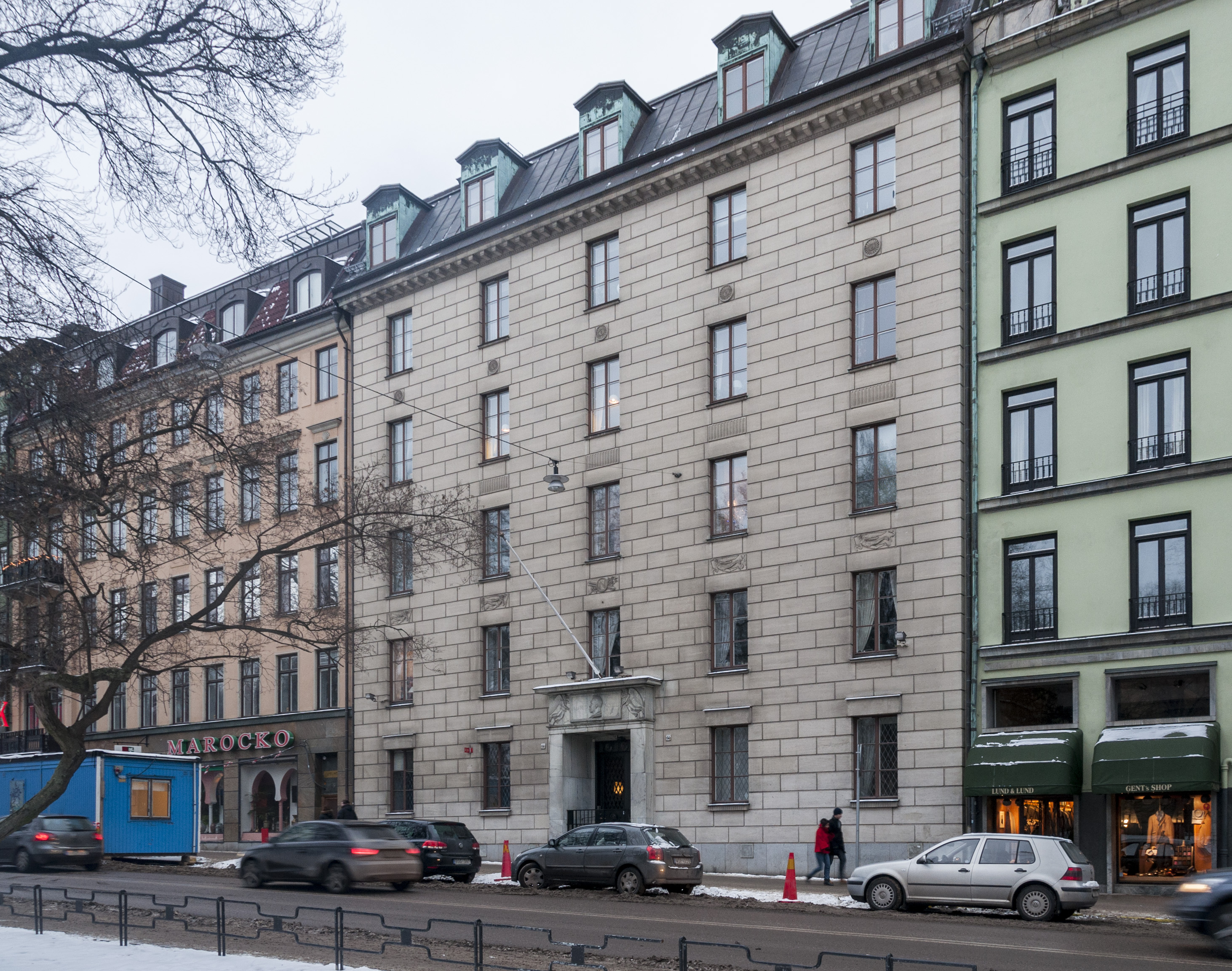 Nobelstiftelsens hus på Sturegatan 14. Byggnadsår 1886, arkitekt Oskar Erikson. 1924-26 fullständig ombyggnad till såväl interiör som fasad, arkitekt Ragnar Hjort, byggherre Nobelstiftelsen.